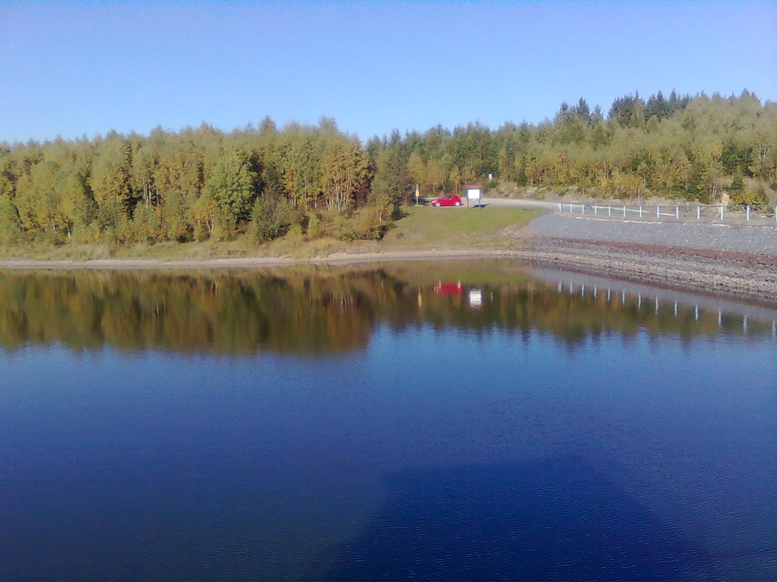 Blick vom Westufer auf Damm sowie Ostufer mit Parkplatz und dort befindlicher großer Infotafel